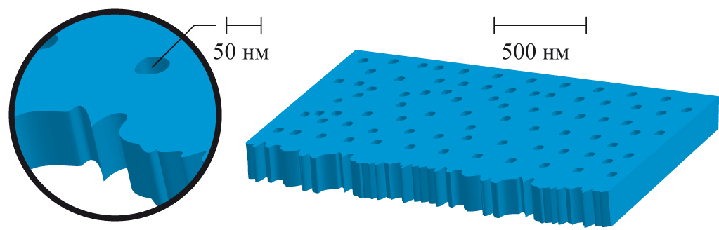 Model membranes prepared by ion-track technology // Модель мембраны, полученной по ионно-трековой технологии